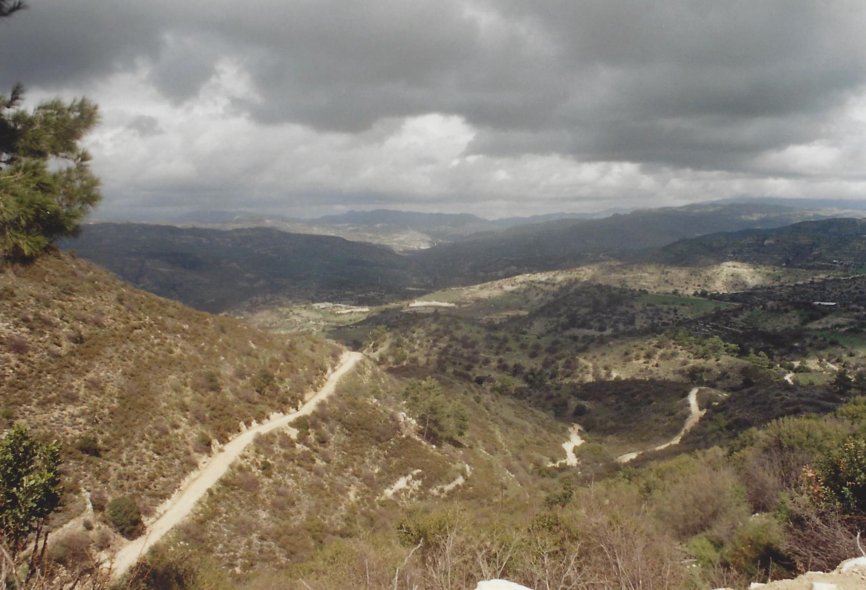 Troodos-Gebirge, südlich vom Olympos (Zypern).